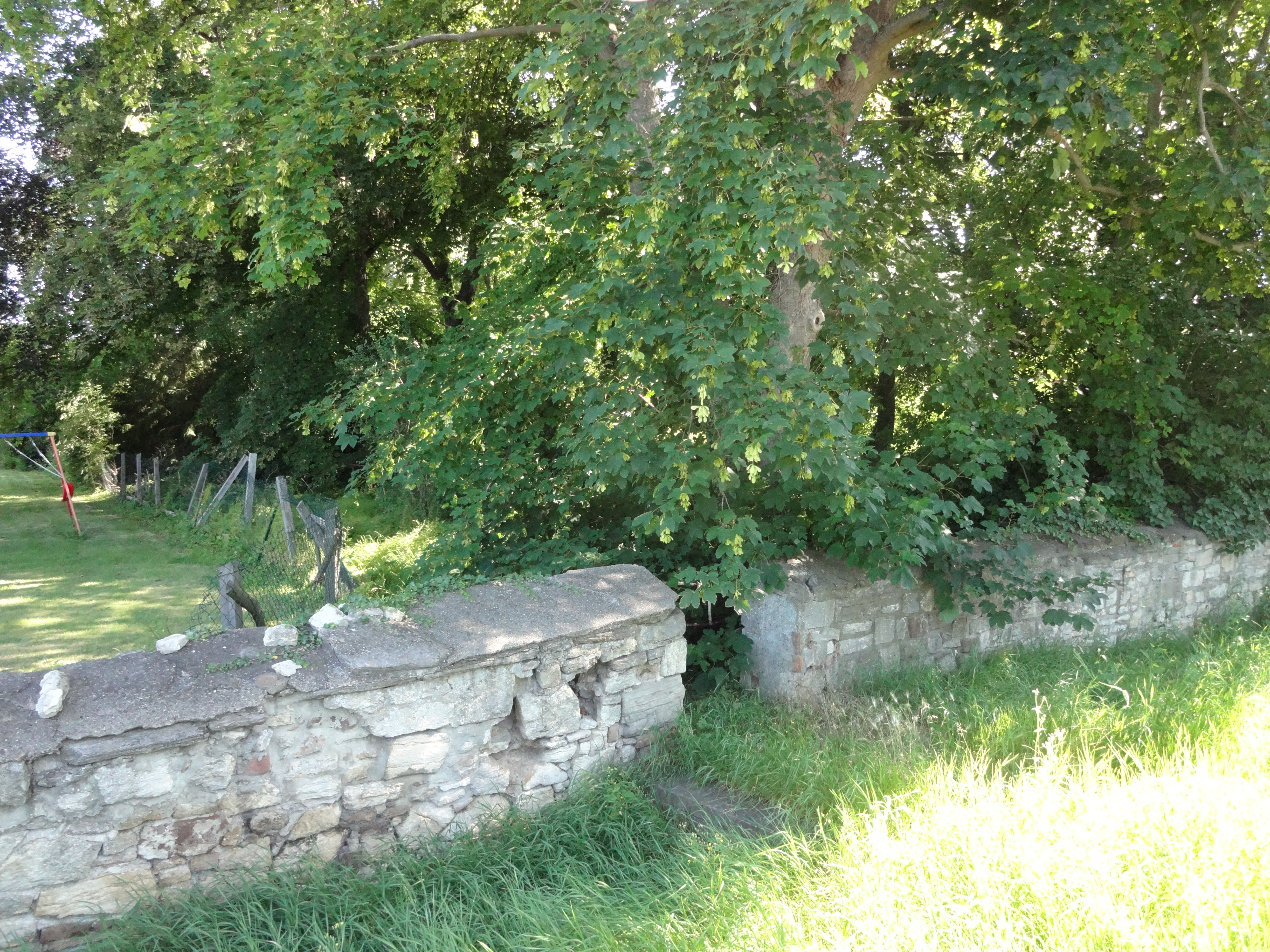 denkmalgeschützter Park am Amtshof in Langeln, Gemeinde Nordharz